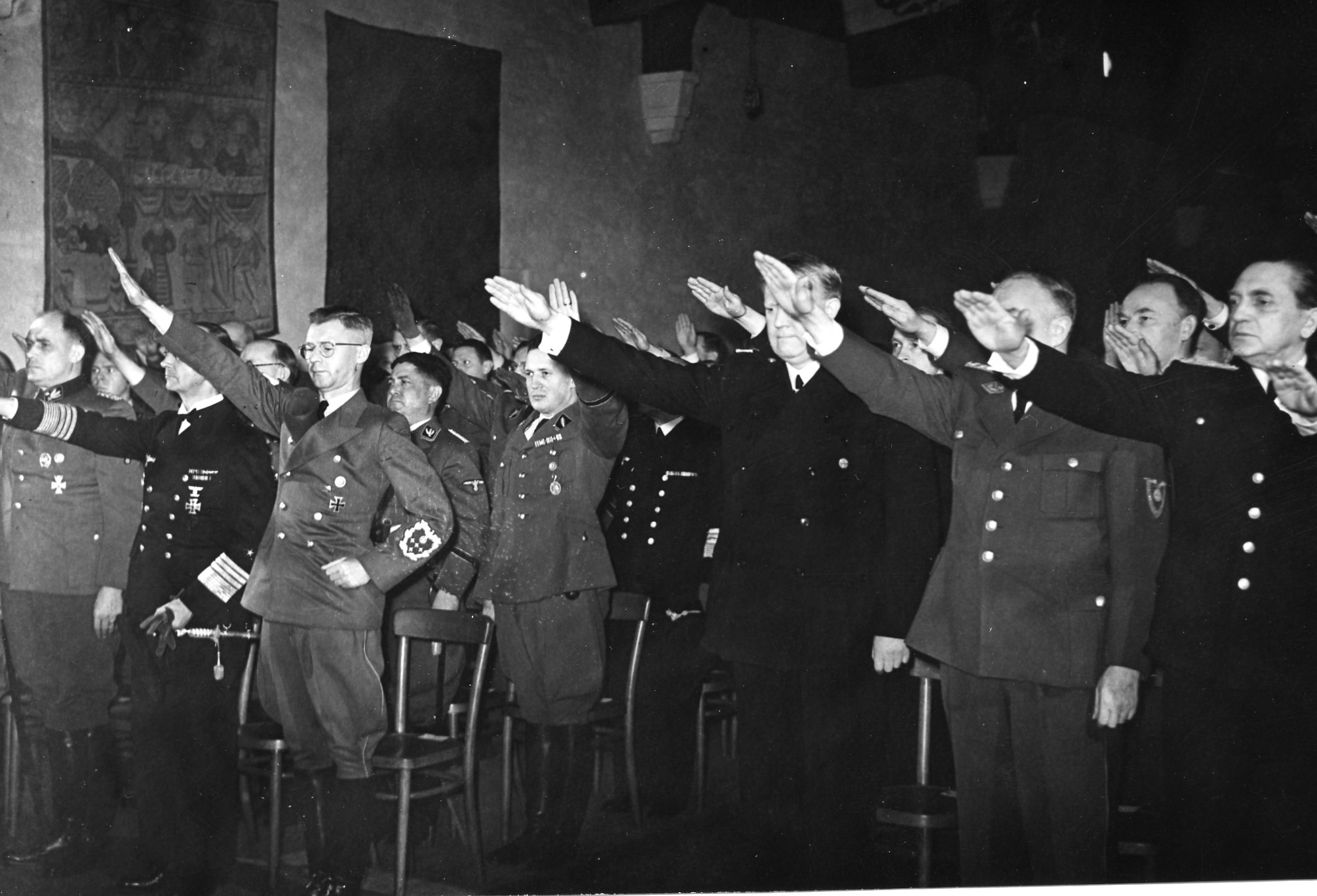 RA/RAFA-3309/U 39A/ /13 img171 «Statsakten» var en seremoni på Akershus slott i Oslo under andre verdenskrig 1. februar 1942 da rikskommissar Josef Terboven innsatte Vidkun Quisling, leder for Nasjonal Samling (NS), som «ministerpresident» i Norge, og de tyskkontrollerte kommissariske ministerne ble erstattet av «den nasjonale regjering» utgått fra NS. «Statsakten» markerte at Quisling fikk den formelle makta i Norge, og ved lov av 12. mars 1942 ble NS «statsbærende parti». Quisling hadde håp om at ordninga også skulle gi NS reell makt og føre til fred mellom Norge og Tyskland, men tysk tilsynsforvaltninga gjennom Reichskommissariat Norwegen fortsatte som før inntil frigjøringa 8. mai 1945.